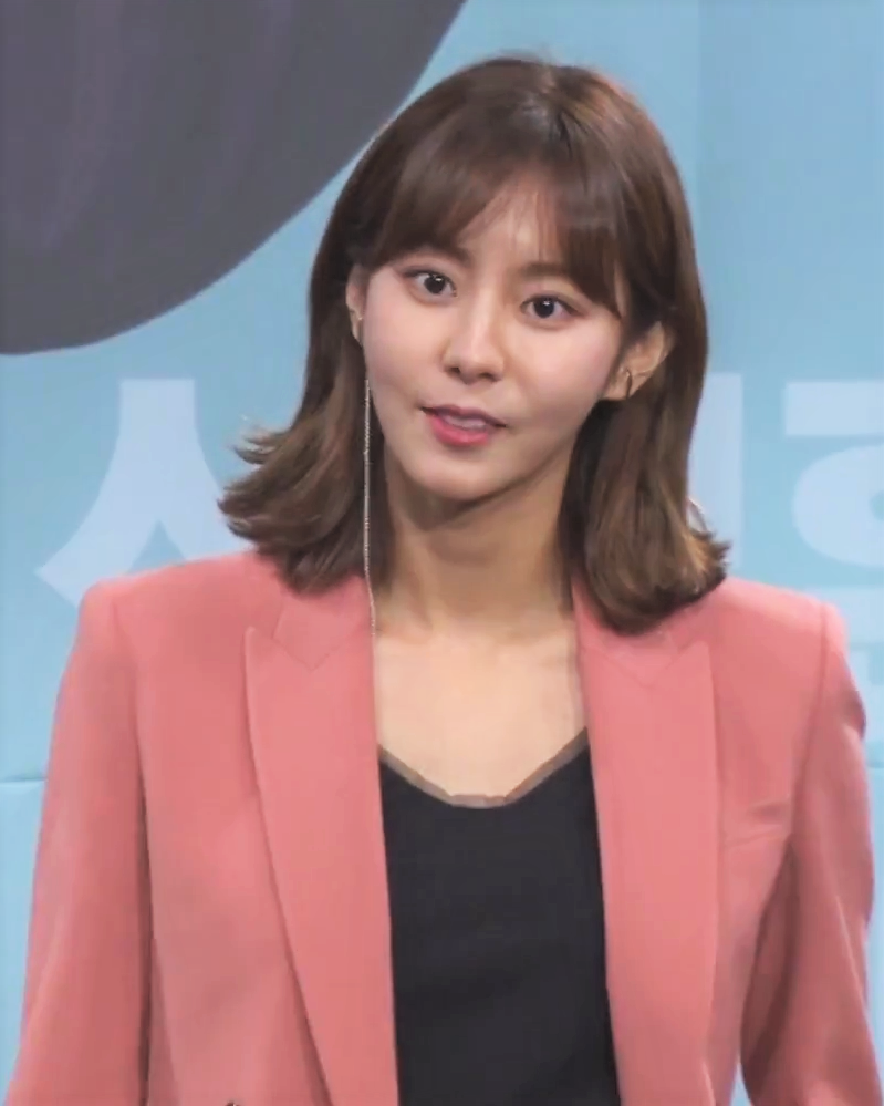 MBC 주말 드라마 '데릴남편 오작두' 제작 발표회